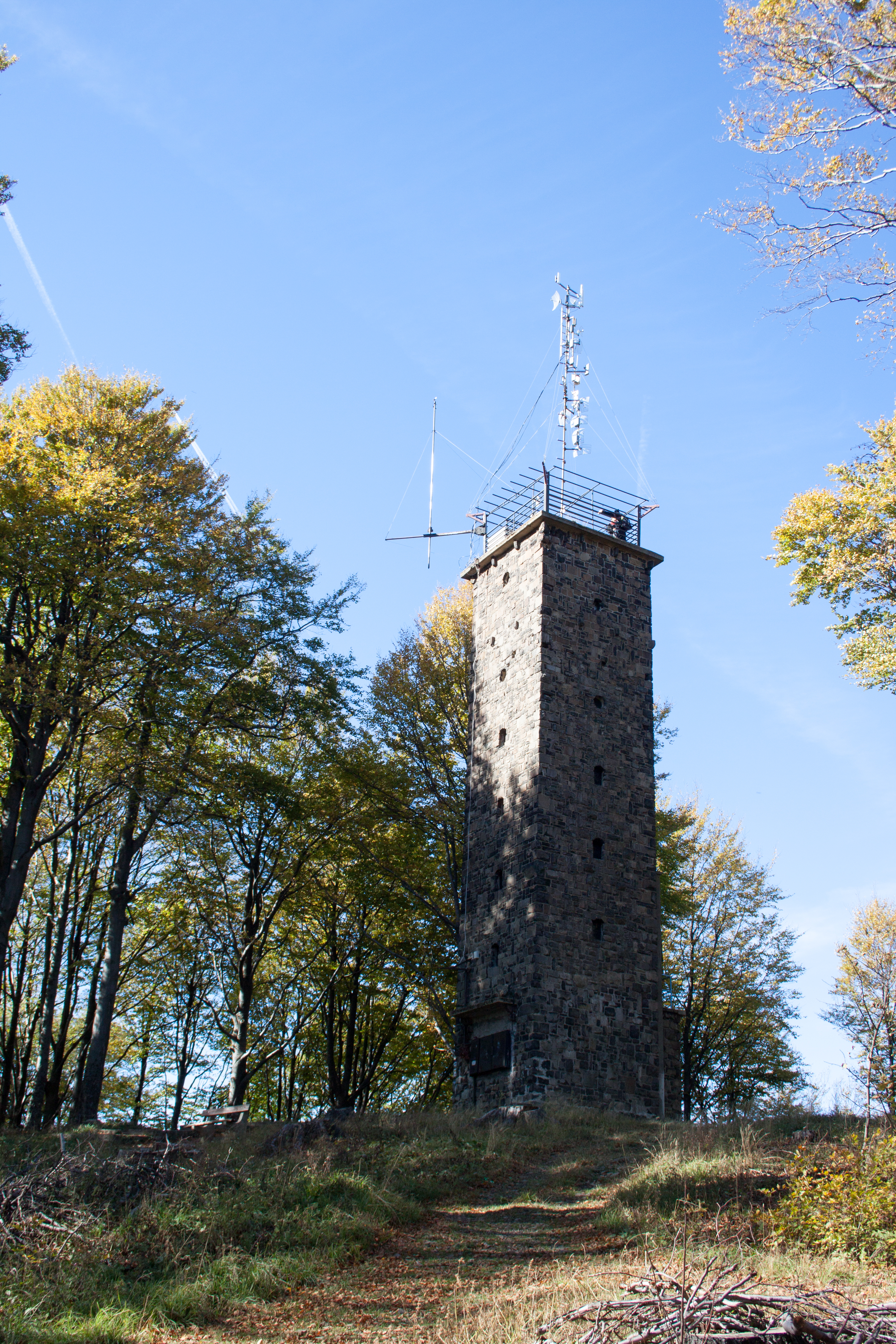 Looking tower in 2012